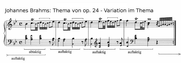 Brahms: Thema aus op. 24. Kennzeichnung der Grundstruktur und der "Variation im Thema". Ambivalenz von Abtakt und Auftakt